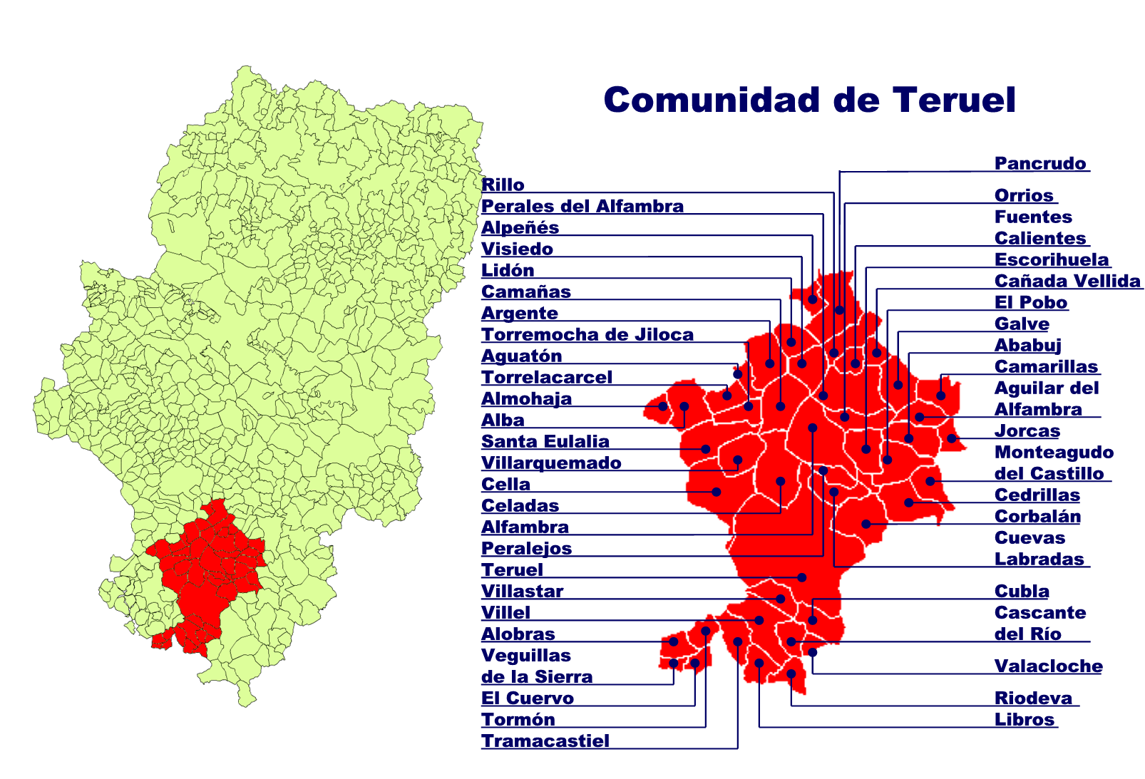 Comarca de la Comunidad de Teruel Creado el 23.10.2005 por Ecelan en base a Image:Aragon municipalities.png